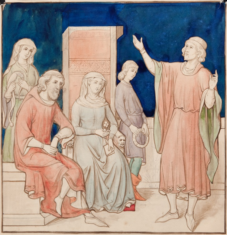 Ontwerp voor één van de panelen van een archiefkast, ontworpen door Pierre Cuypers en uitgevoerd door het atelier Cuypers en Stoltzenberg en de schilder Joseph Johan Hubert Lücker (zie File:Archiefkast Pierre Cuypers.jpg). De bovenste rij paneeldeuren heeft voorstellingen van de vrije kunsten (astronomie, rekenkunde, wiskunde, retorica, poëzie, en muziek). De onderste rij deuren stelt voor de geboden kunsten (beeldhouwkunst, bouwkunst en schilderkunst).